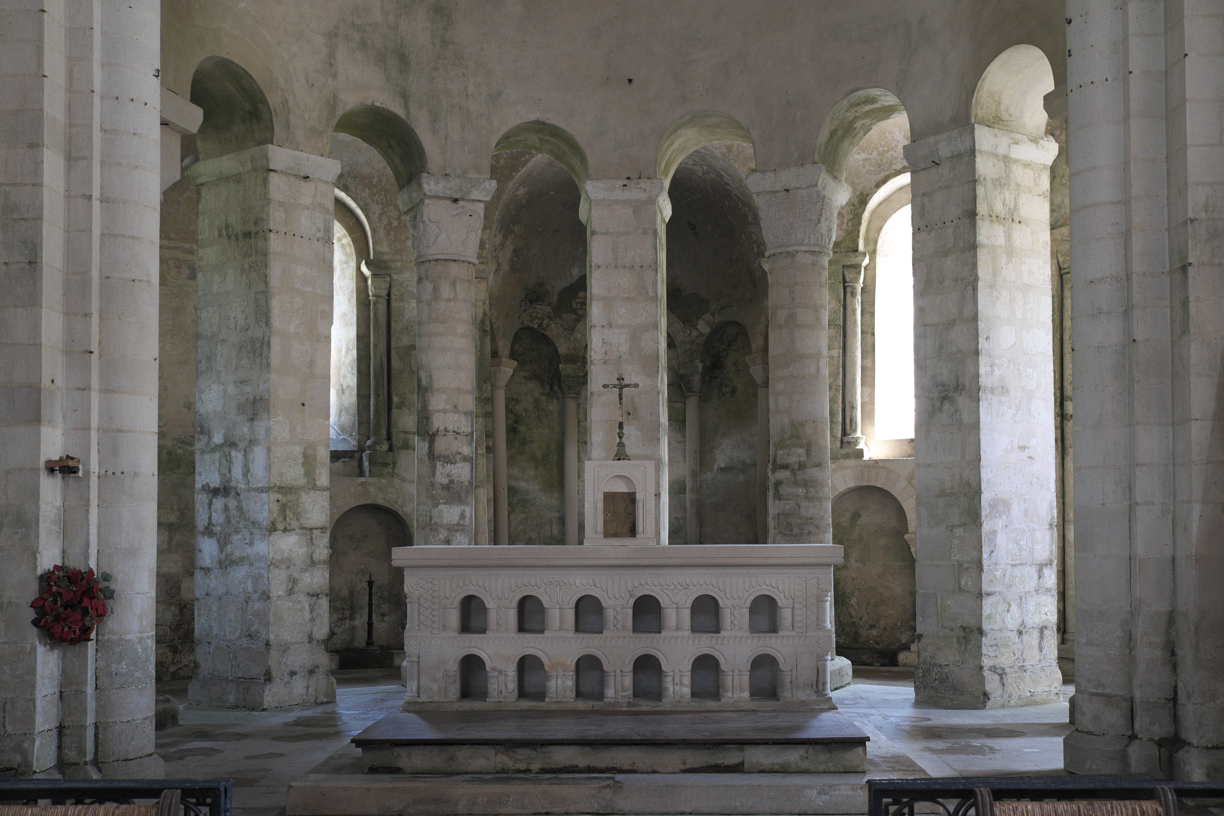 Kirche Saint-Étienne in Vignory im Département Haute-Marne (Champagne-Ardenne/Frankreich), Apsis mit Chorumgang